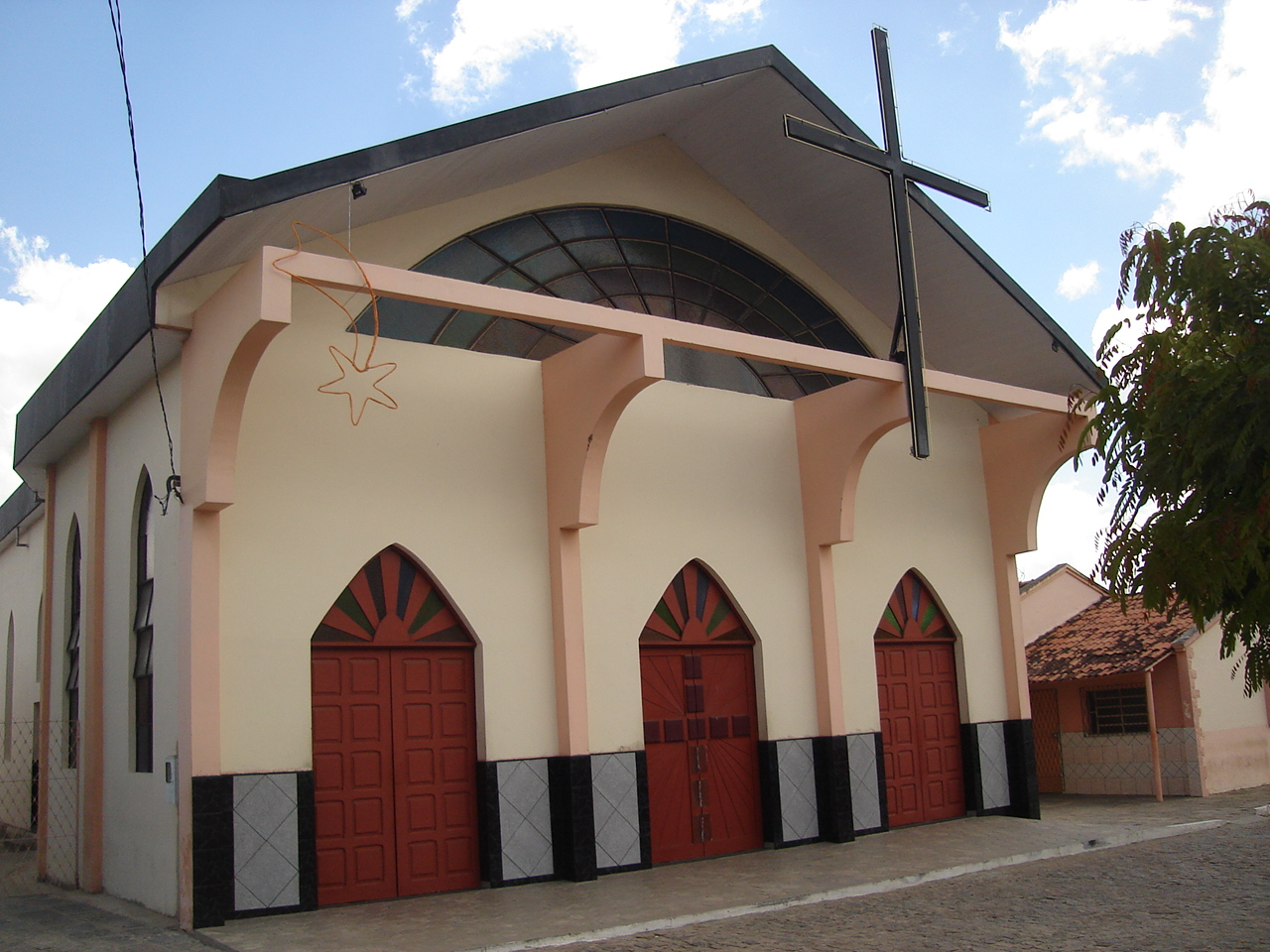 Igreja no bairro de Bodocongó em Campina Grande, Paraíba, Brasil.